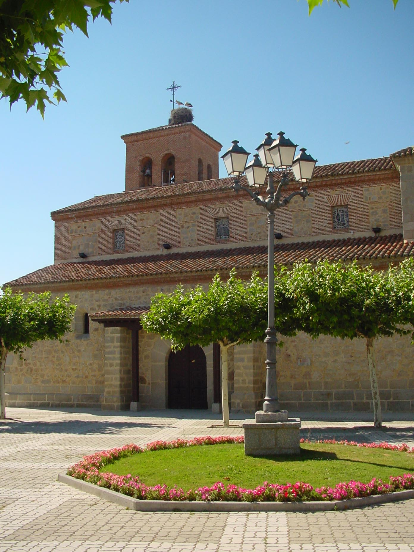 Iglesia parroquial San Juan Evangelista en Quijorna.